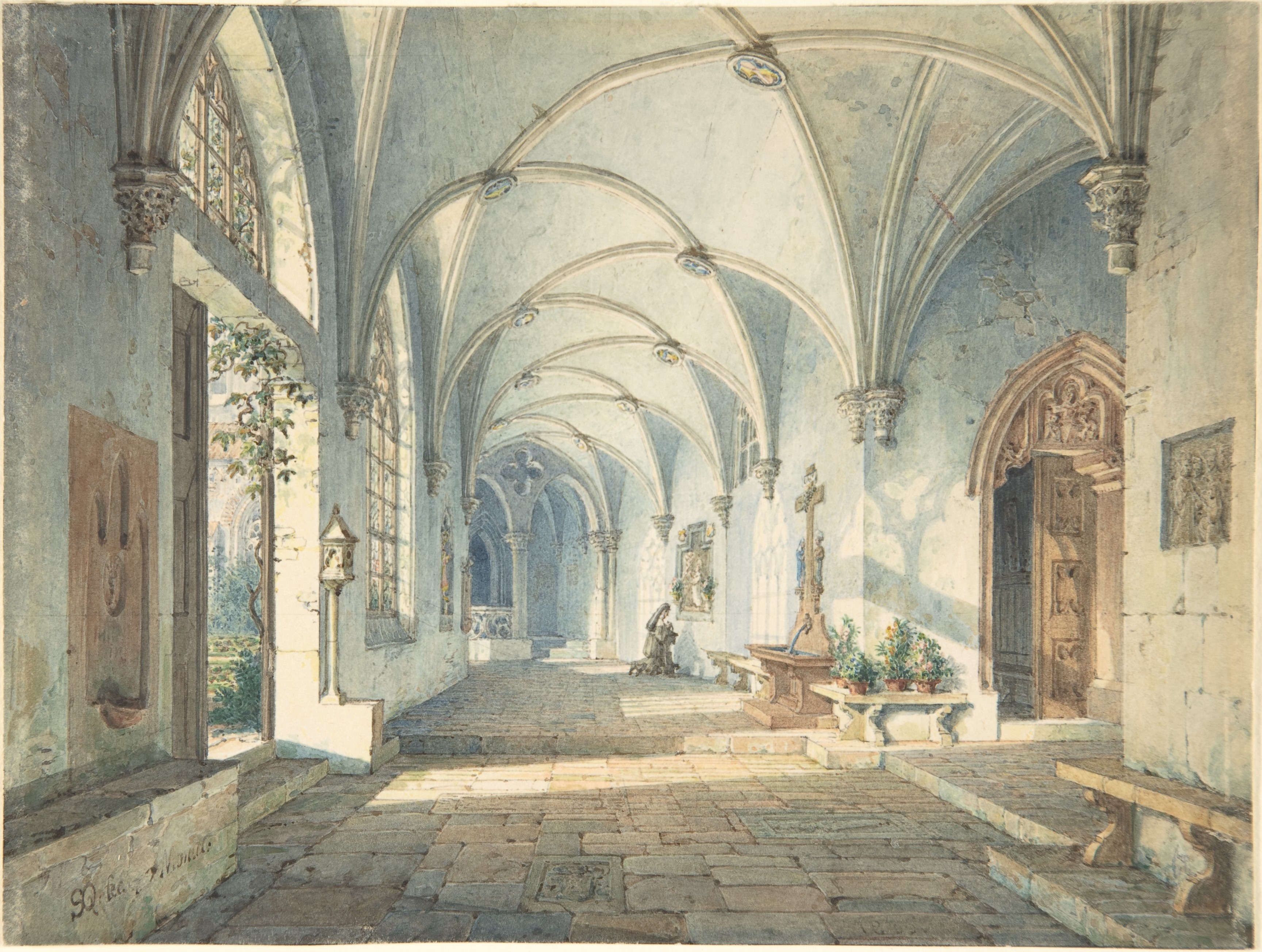 Drawing; Drawings